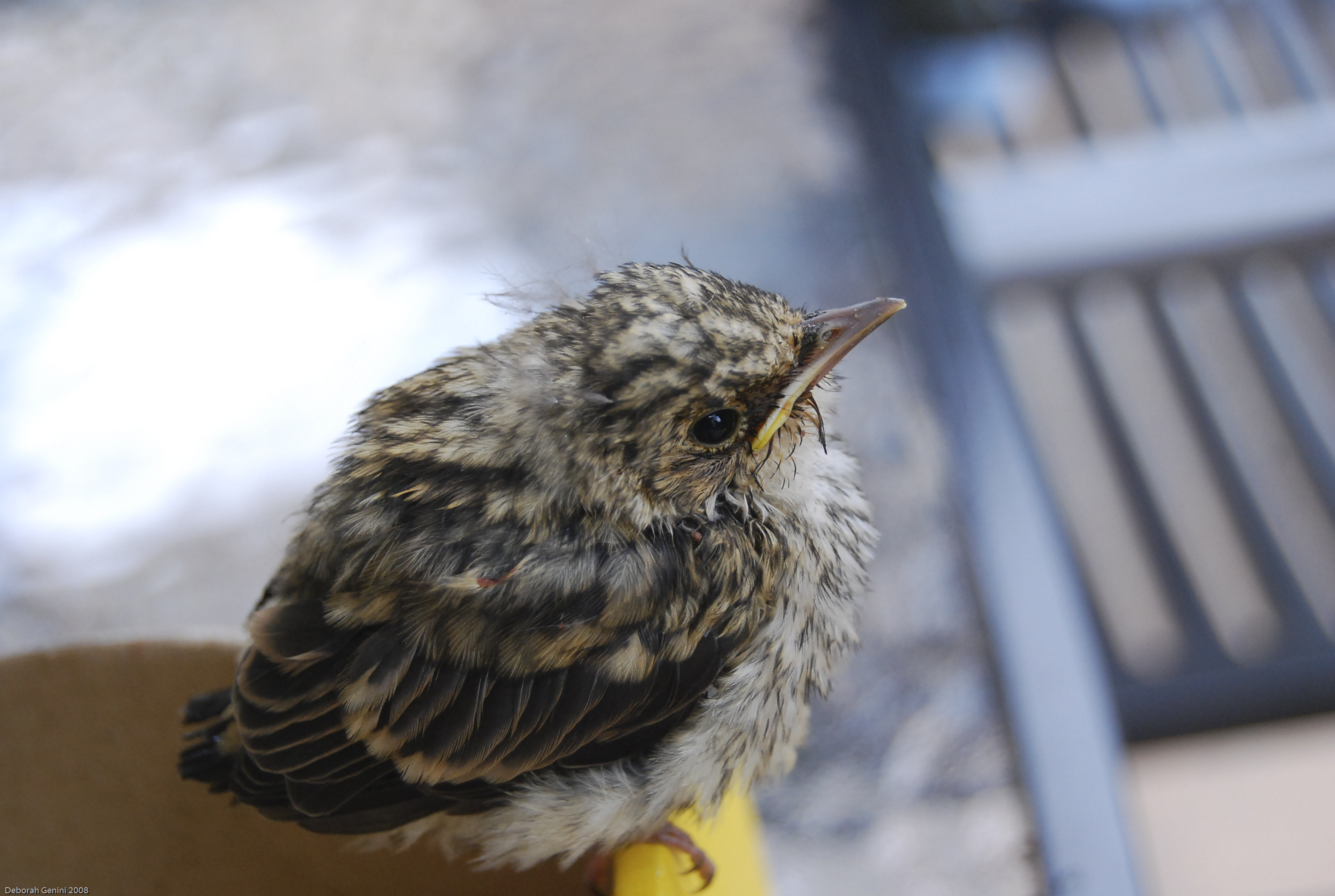 Alauda arvensis, Feldlerche, Jungvogel, Babyvogel, Nestling, Ästling, männlich, ca. 10 Tage alt